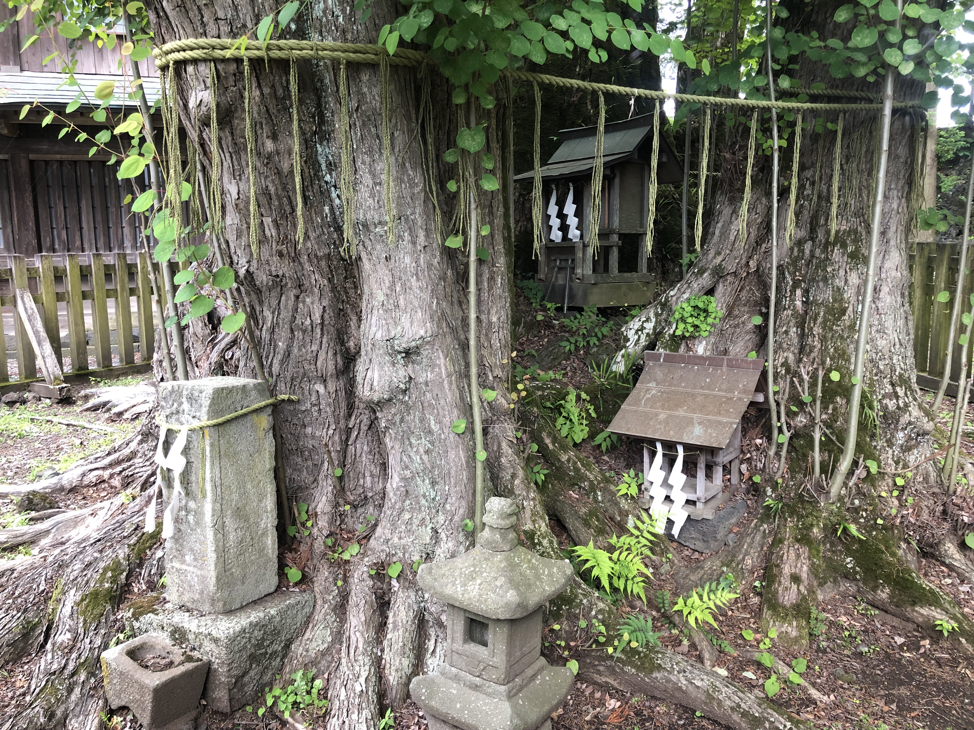 小室浅間神社の「大塔宮桂之古跡」大塔宮社・雛鶴社・首塚